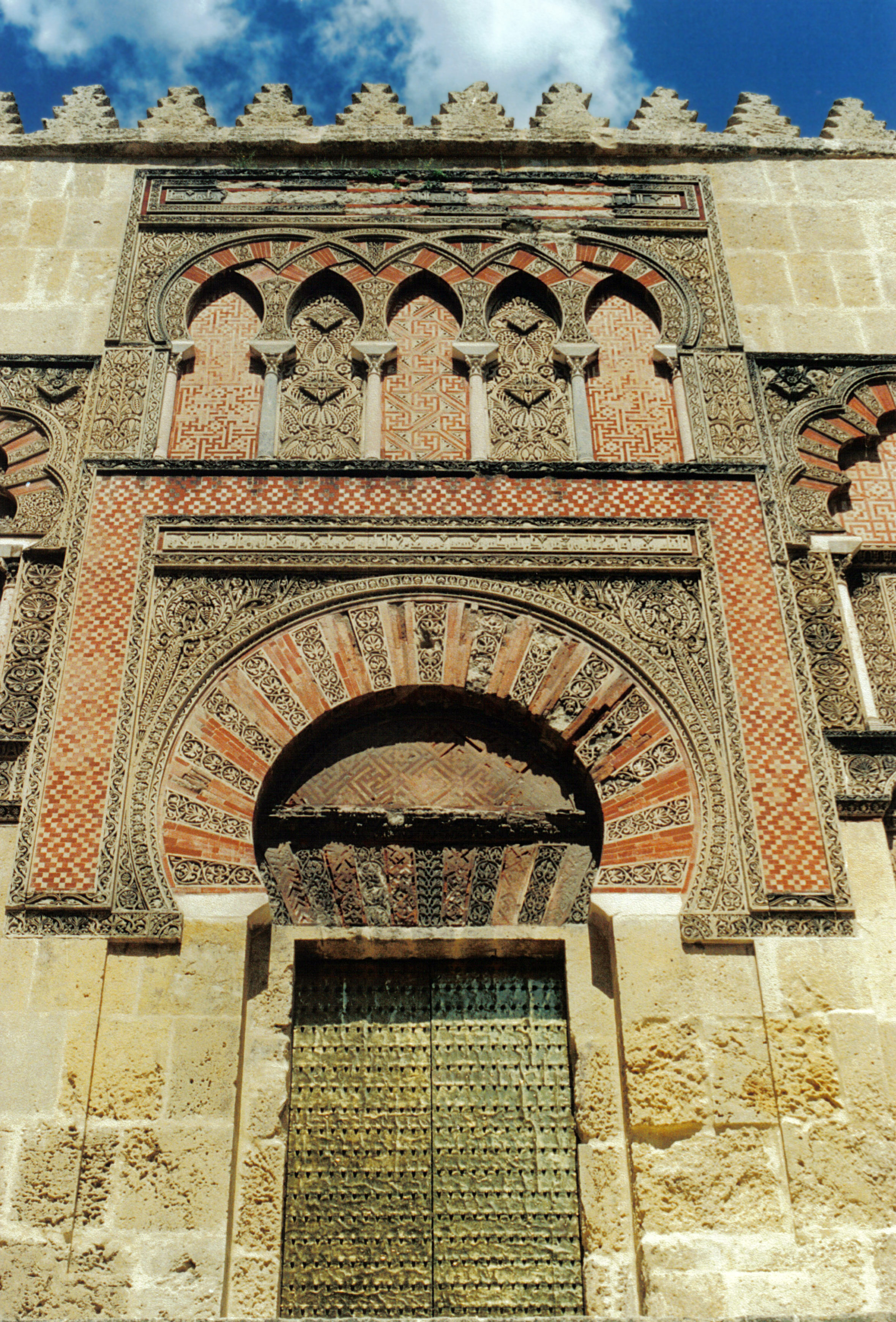 Cordoue - Mosquée - Porte de l'extension du calife Al-Hakam II (961)